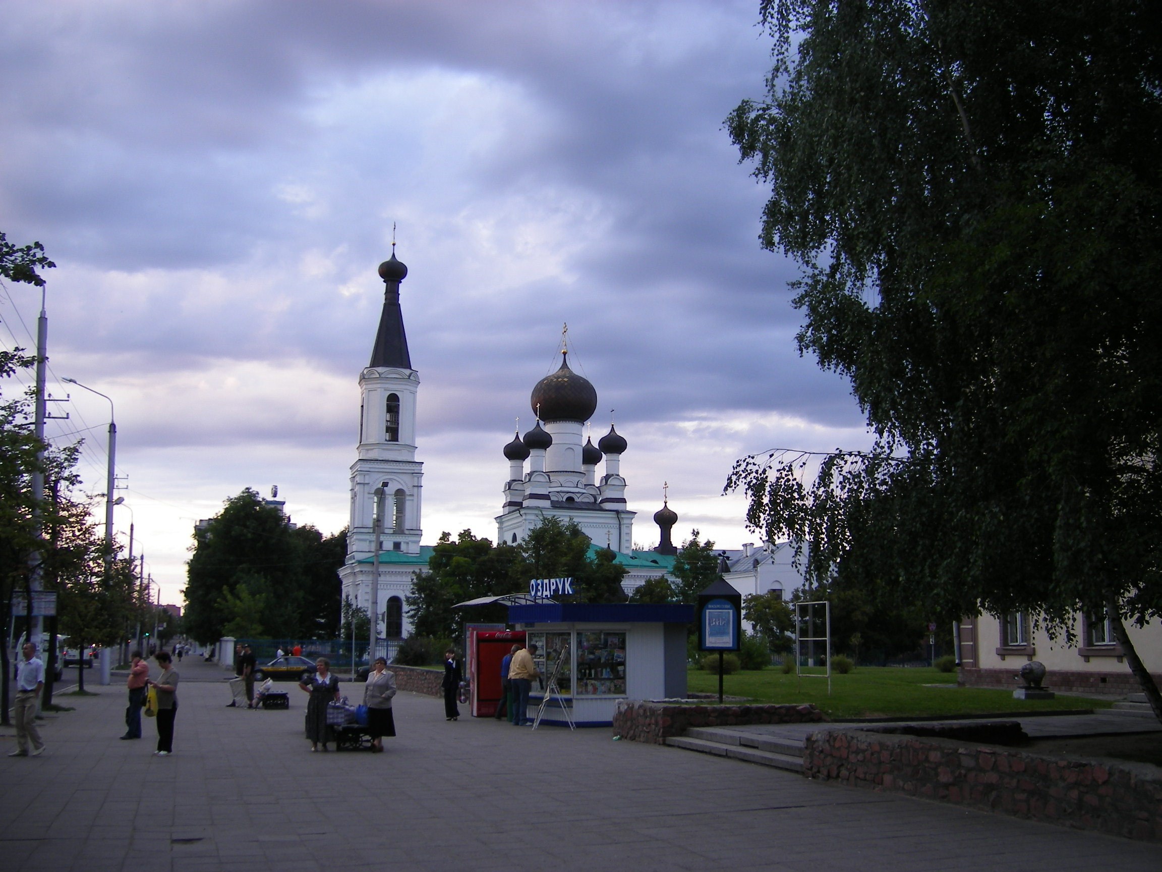 Mahilyow, Cathedral (собор Трех Святителей)